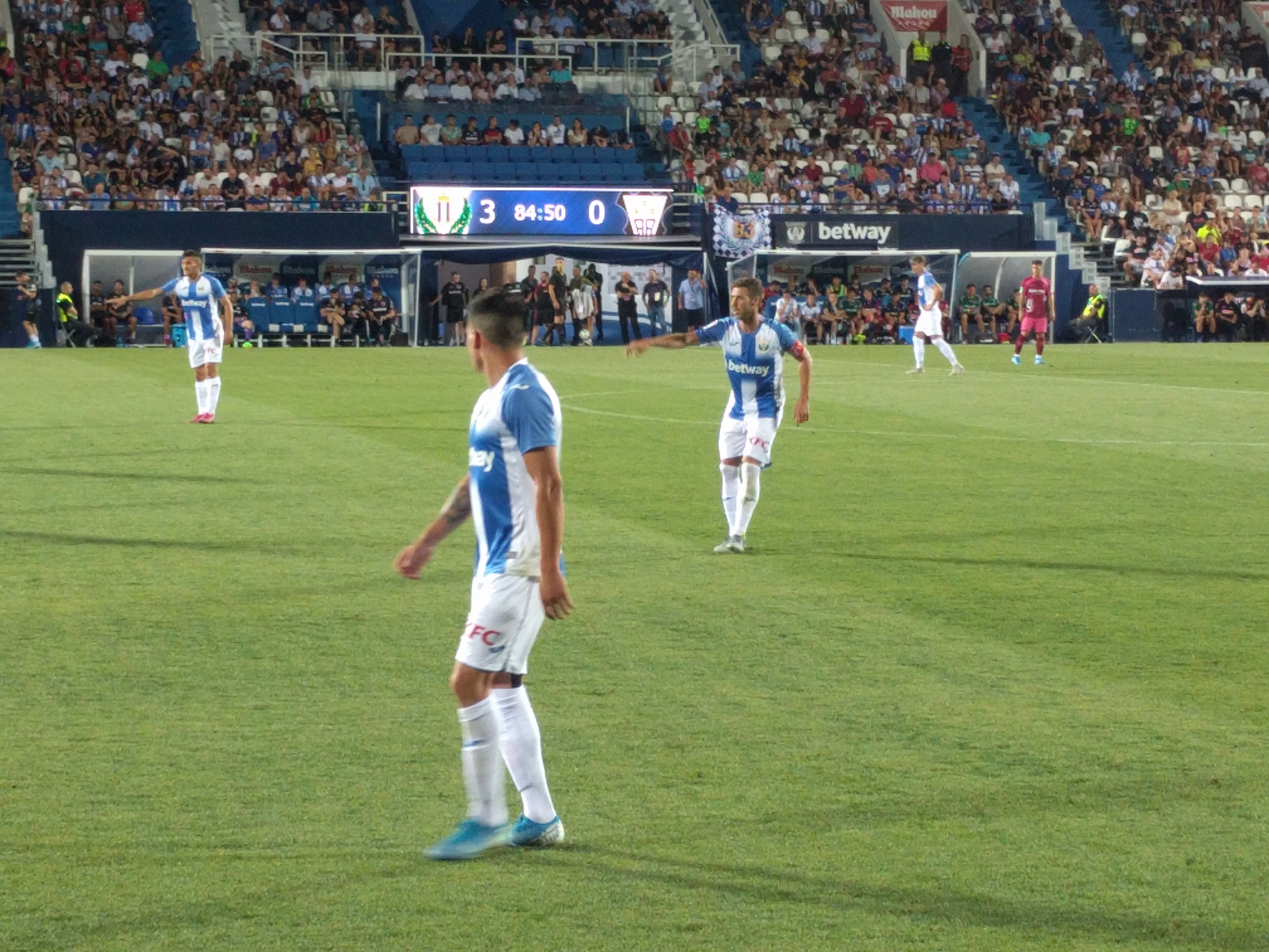 Rubén Pérez en el XL Trofeo Villa de Leganés, con la camiseta del Leganés